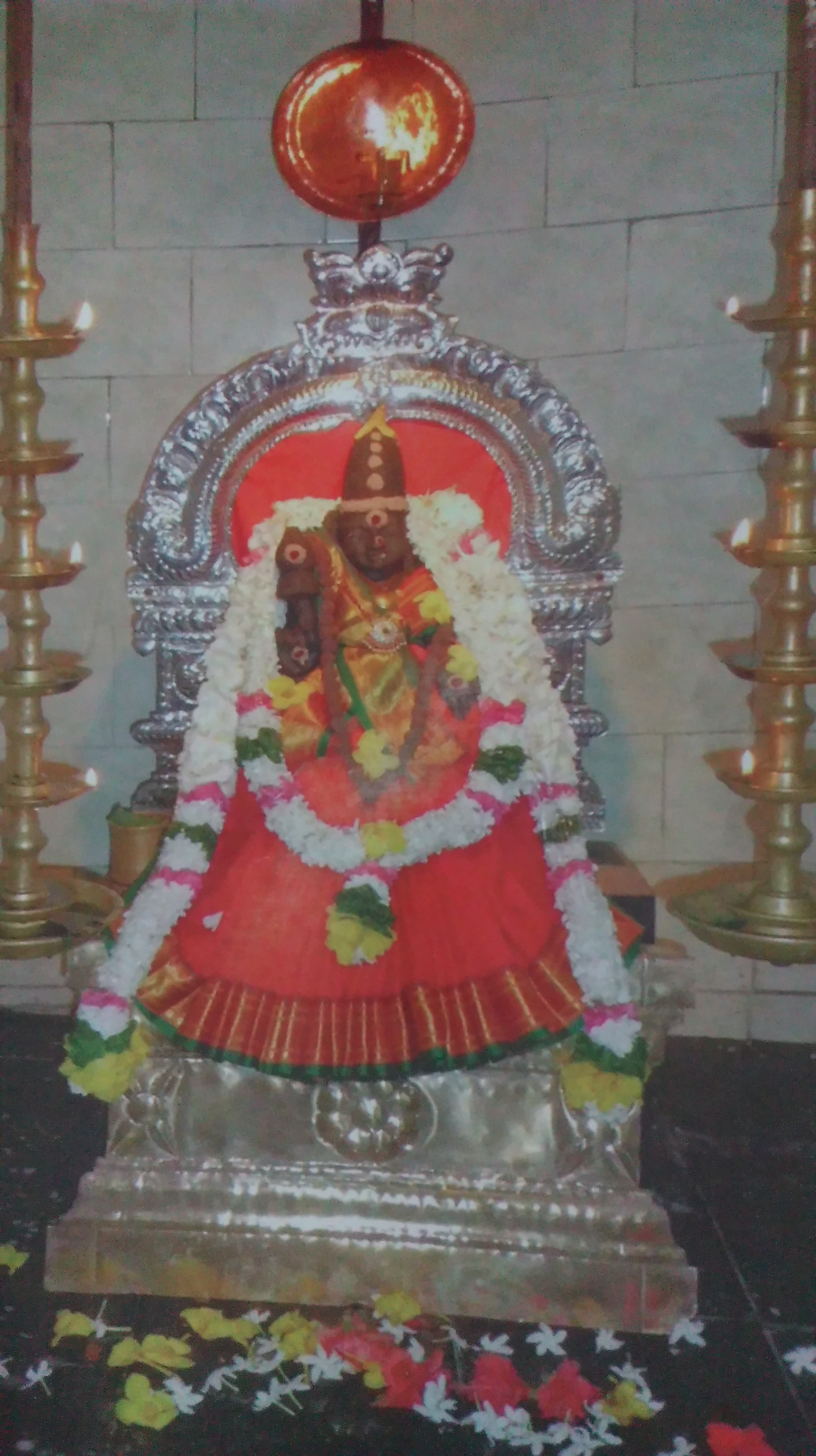 புதிதாக ஸ்தாபிக்கப்பட்ட கருங்கல் விக்கிரகம்